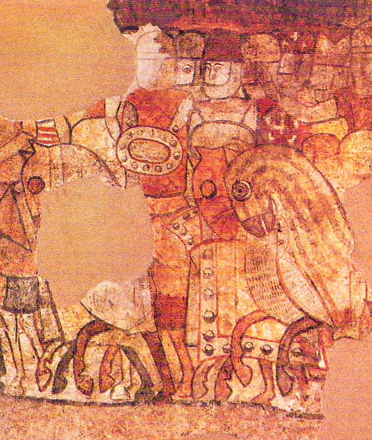 Pintura mural del Saló del Tinell al Palau Reial Major de Barcelona. Foren realitzades després de la mort de Jaume I d'Aragó i es conserven al mur romànic. S'hi aprecia la representació de Nunó Sanç.